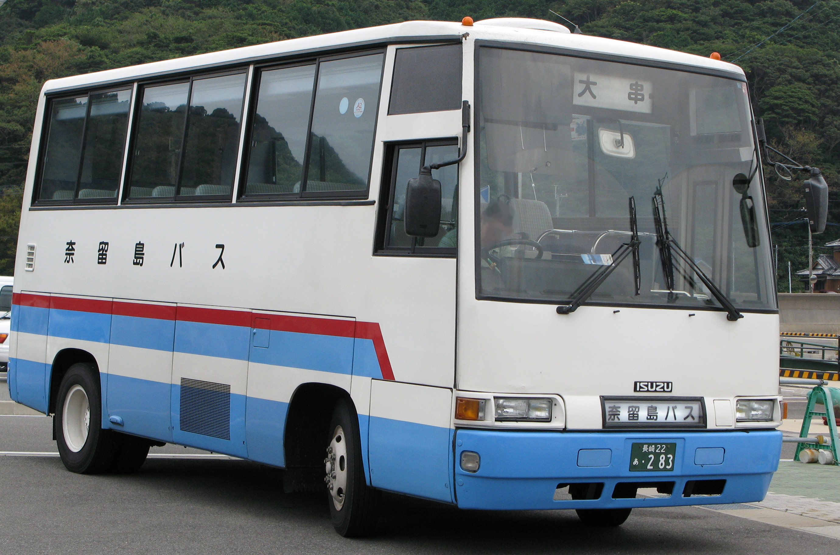 奈留島バス（正式社名：丸濱産業）の路線バスの車両